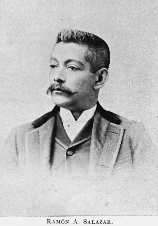 Escritor y periodista guatemalteco Ramón A. Salazar.